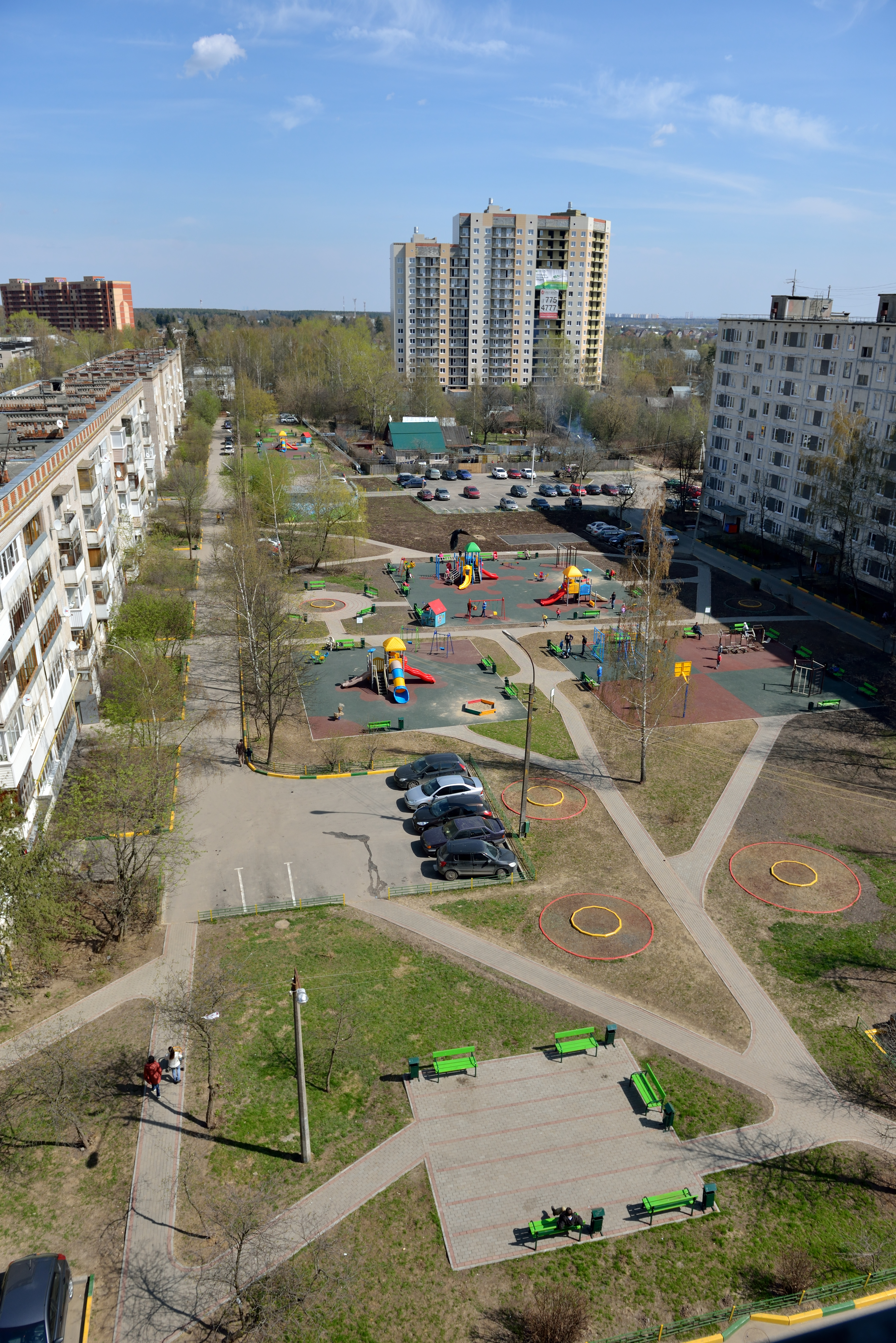 Дворик в поселении Кокошкино, г.Москвы